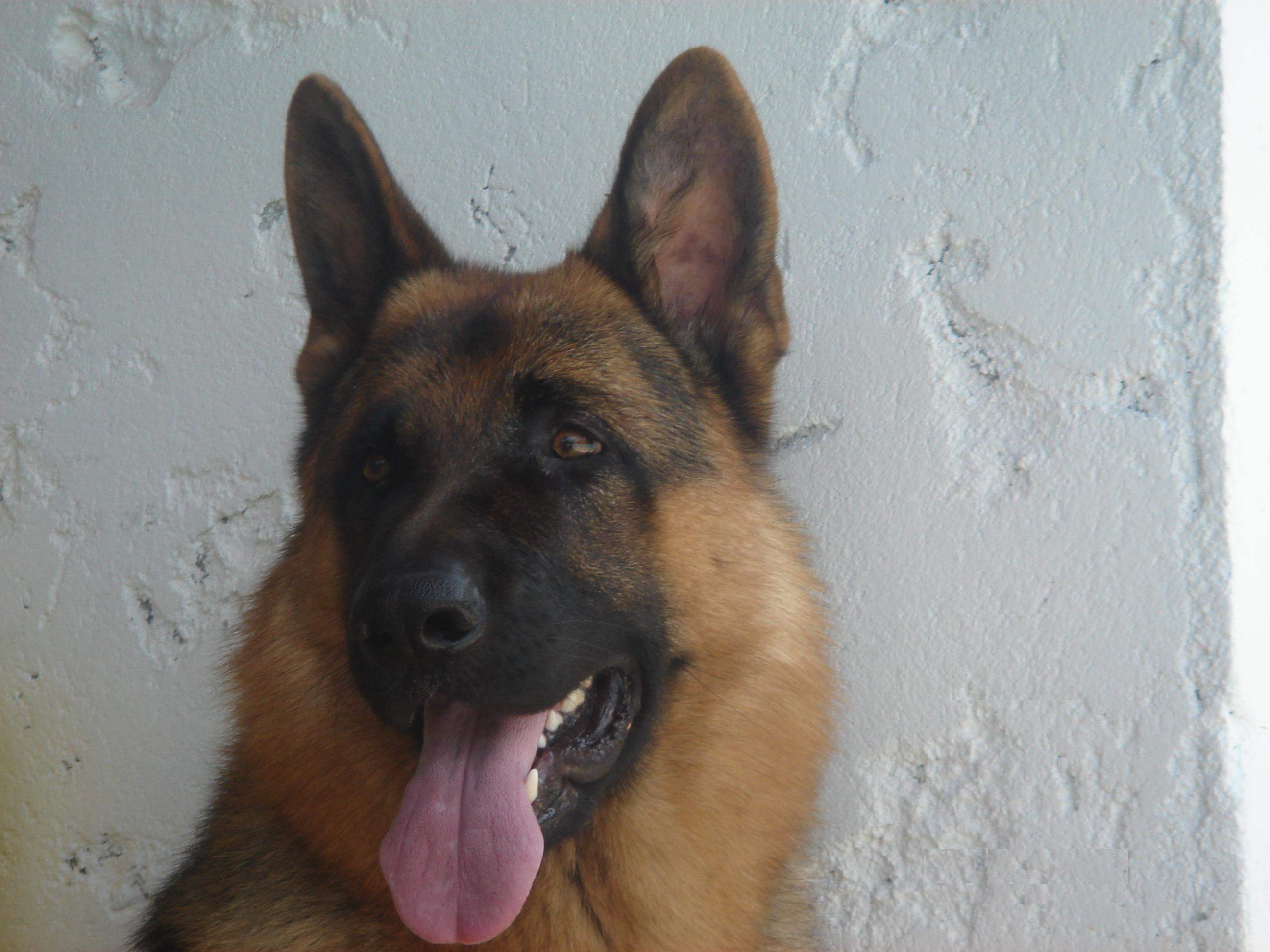 Dick Von Armino - São Paulo - Brasil